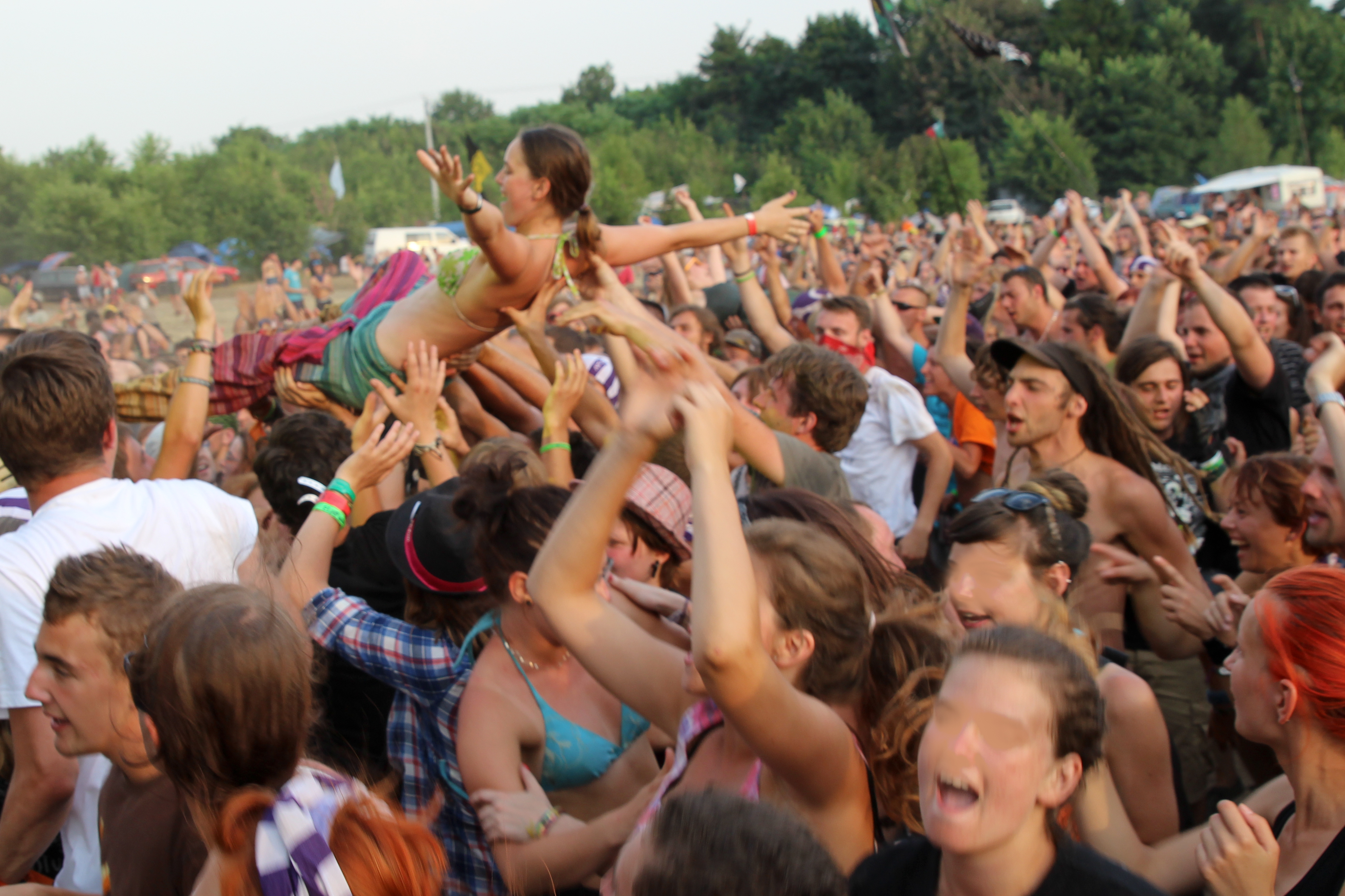 Przystanek Woodstock w 2013 r.